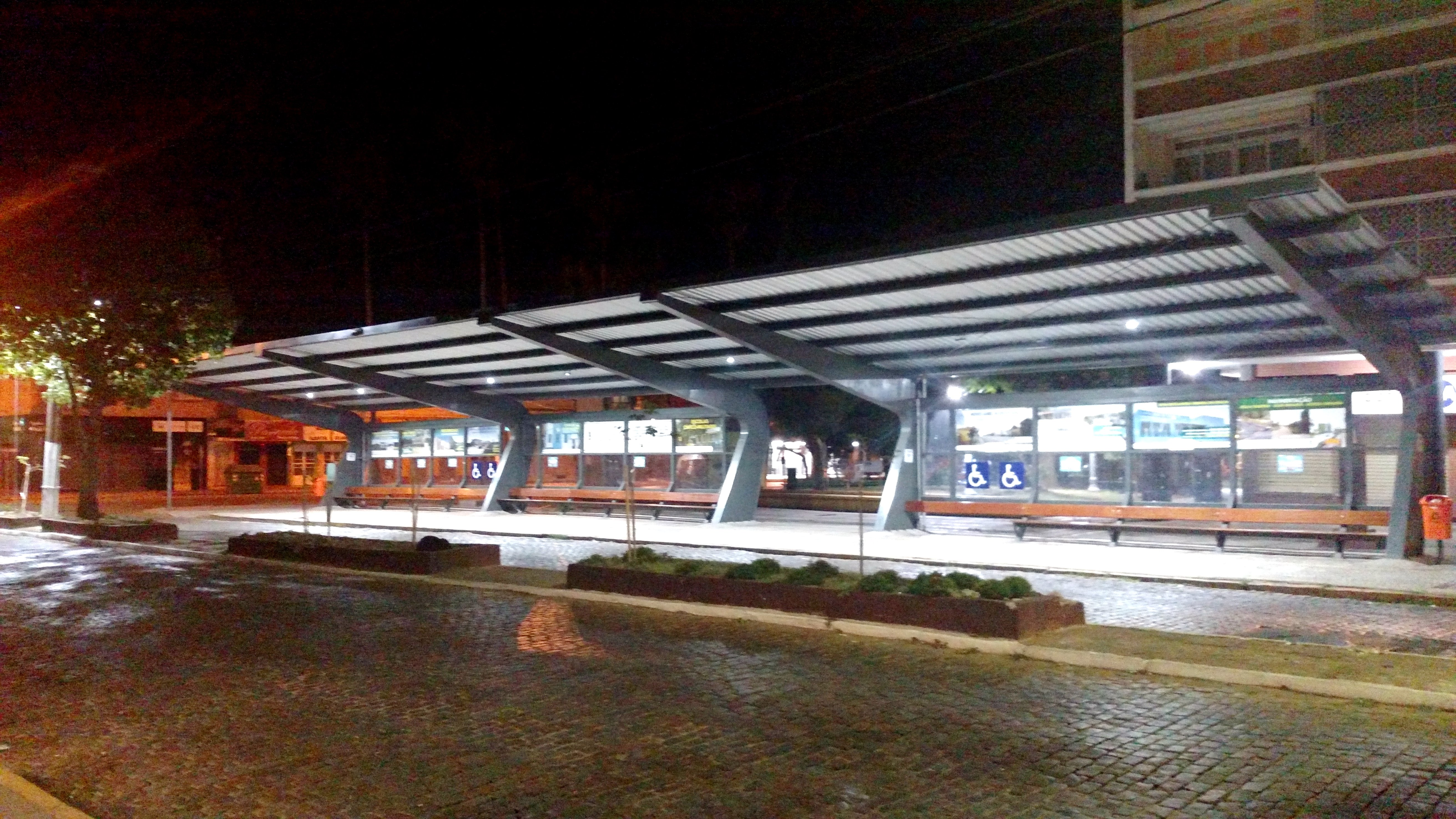 Novo ponto de ônibus do Calçadão, R. Gen. Neto, Bagé